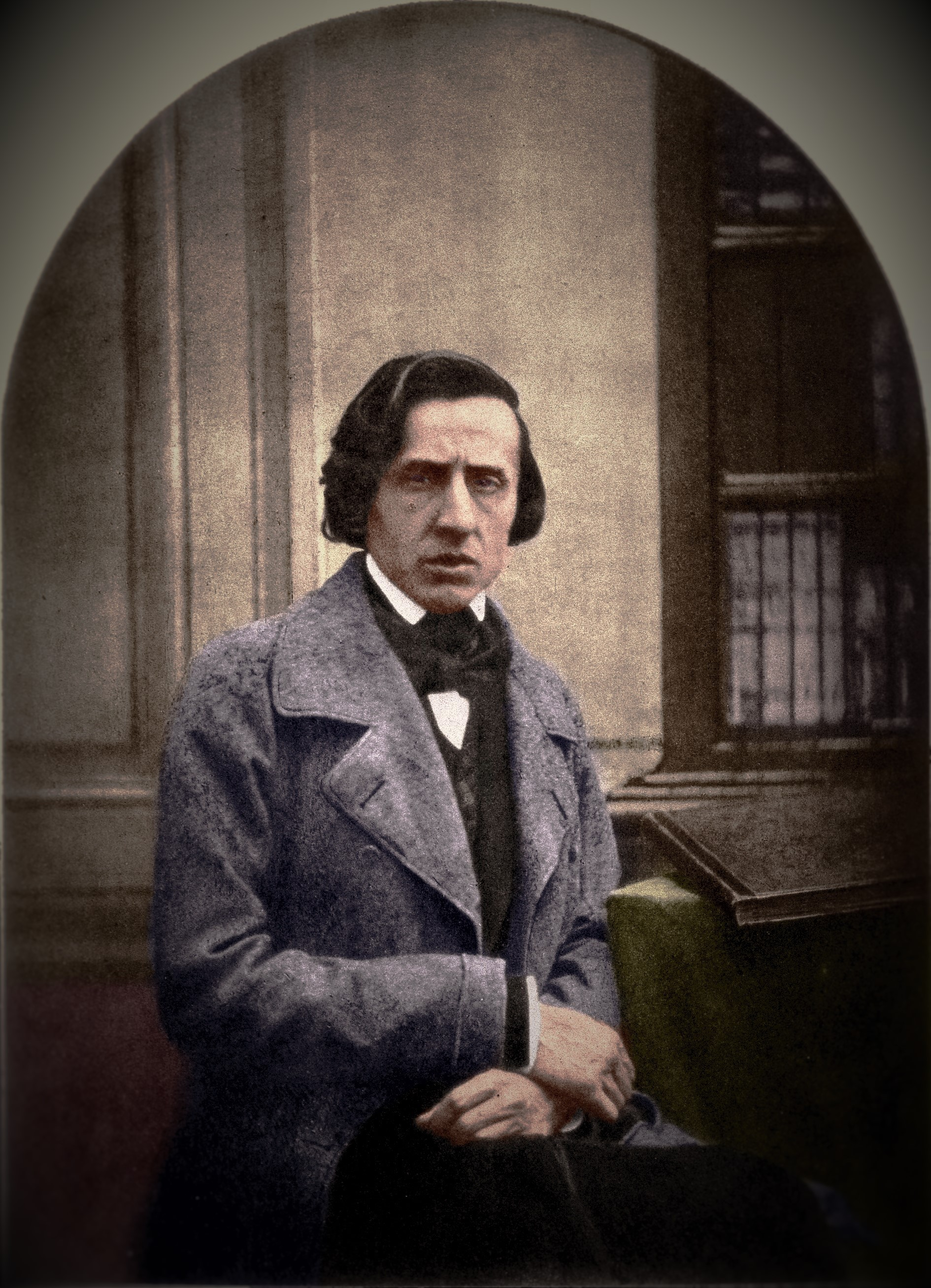 ルイ＝オーギュスト・ビソンによる晩年のショパン